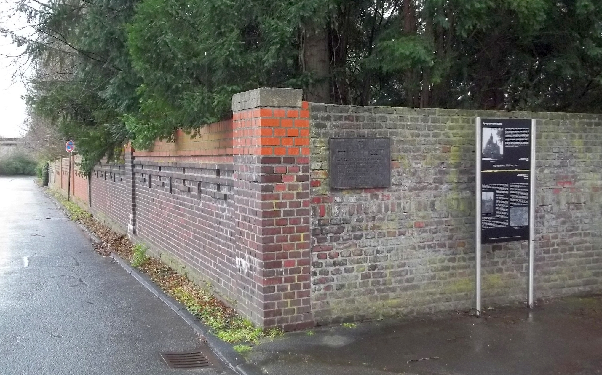 Herne-Wanne Gedenktafel zur Synagoge Wanne-Eickel an der Langekampstrasse mit Begrenzungsmauer zum ehemaligen Synagogengrundstück